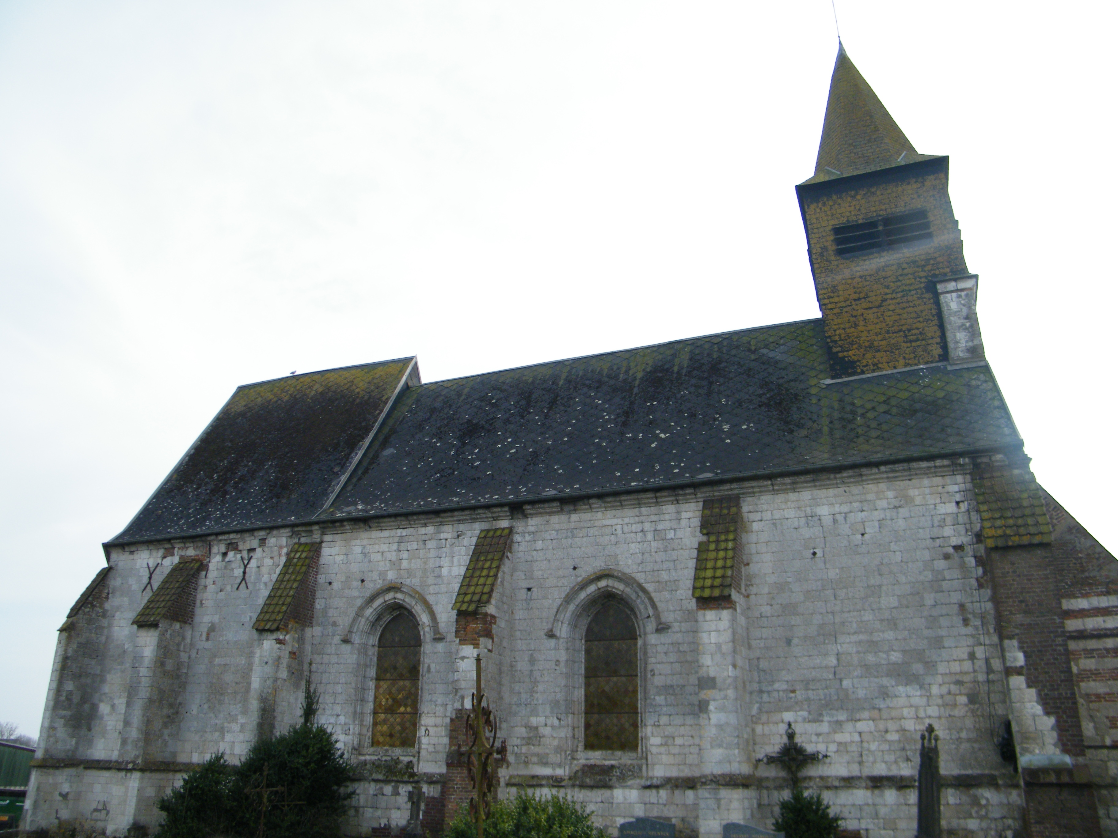 L'église Saint-Sulpice de Mesnil-Domqueur.